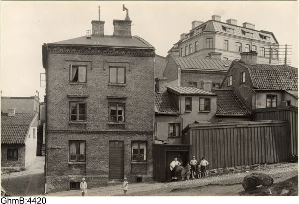 Telegrafgatan 2-6, Göteborg, GhmB-4420